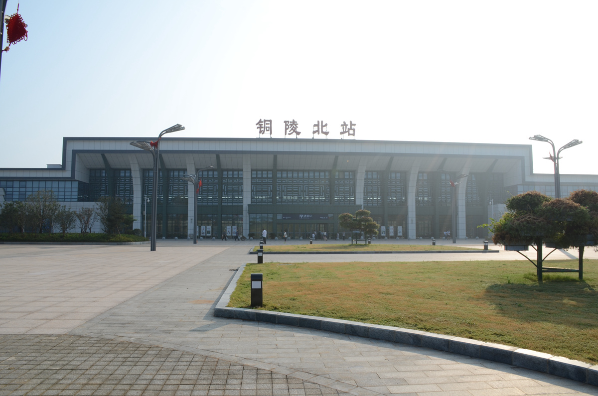 铜陵北站站房